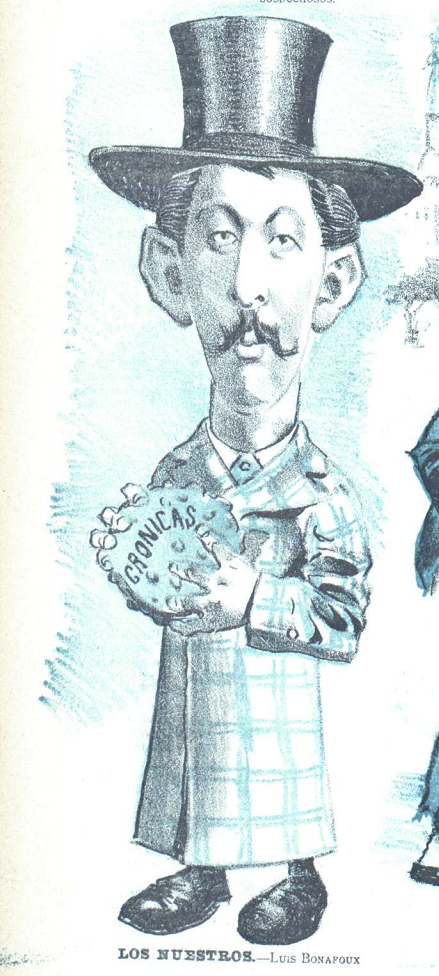 Caricatura.